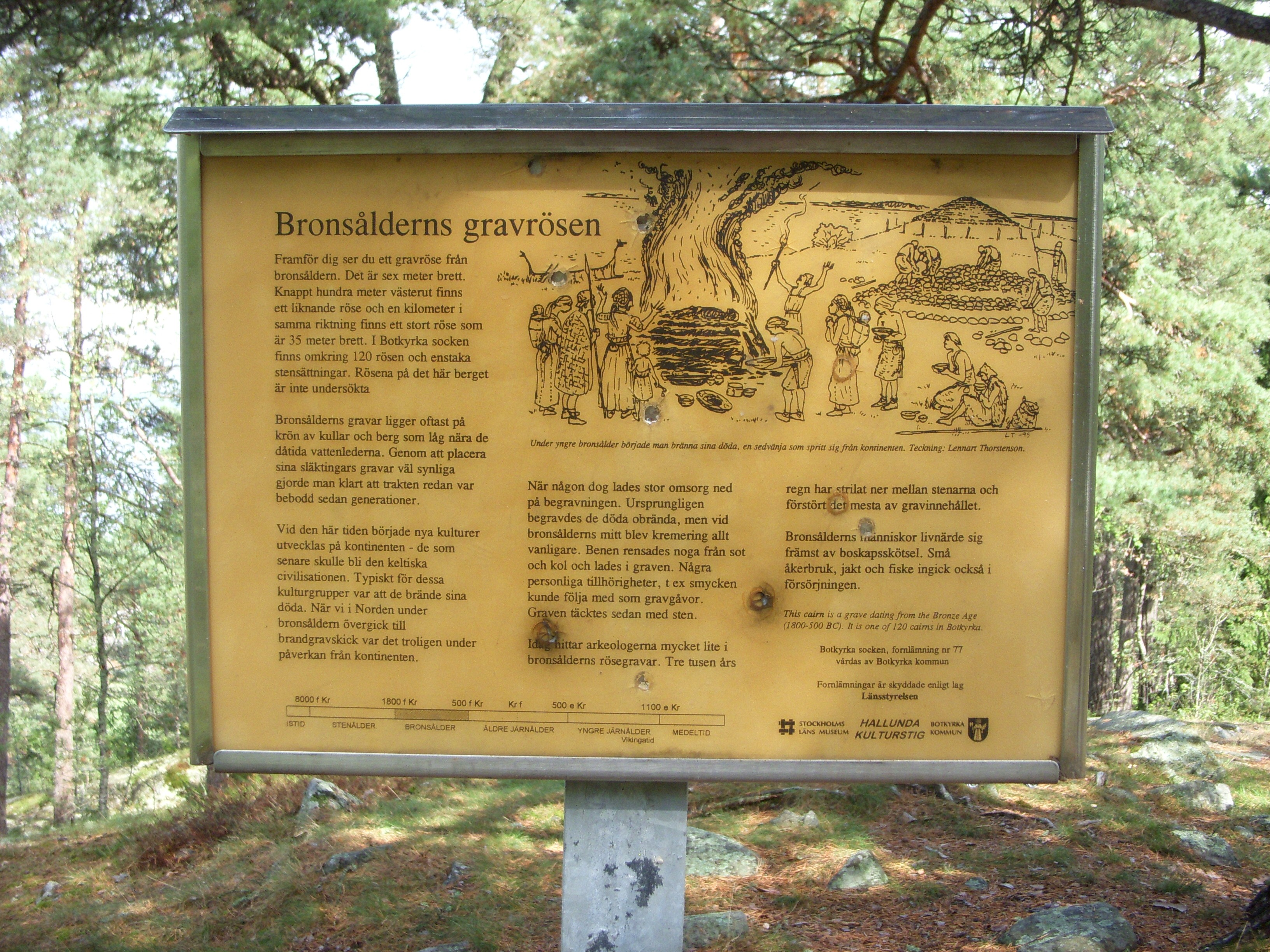 Bronsålderns gravröse, RAÄ-nummer Botkyrka 65:1, infoskylt vid Hallunda kulturstig